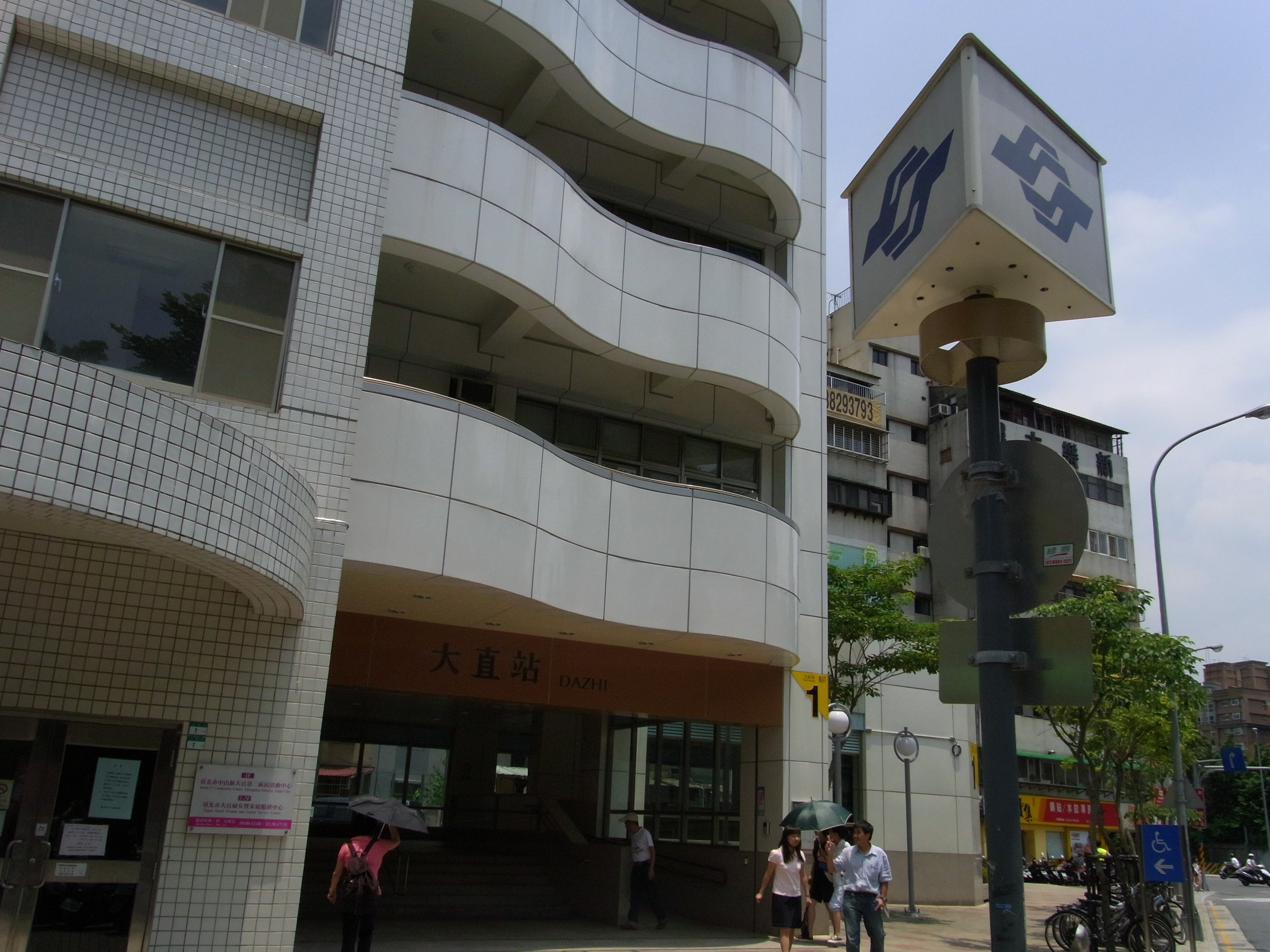 臺北捷運內湖線大直站1號出口。